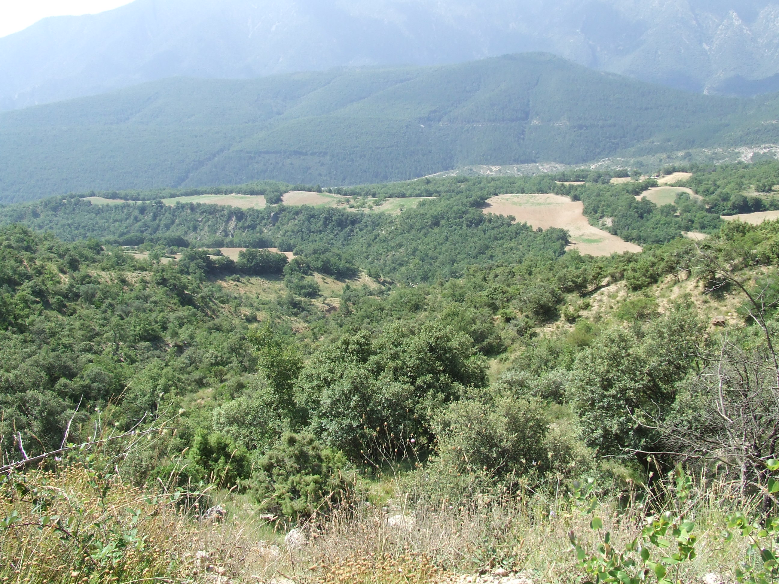 La llau de la Grallera (Mur, Castell de Mur, Pallars Jussà)